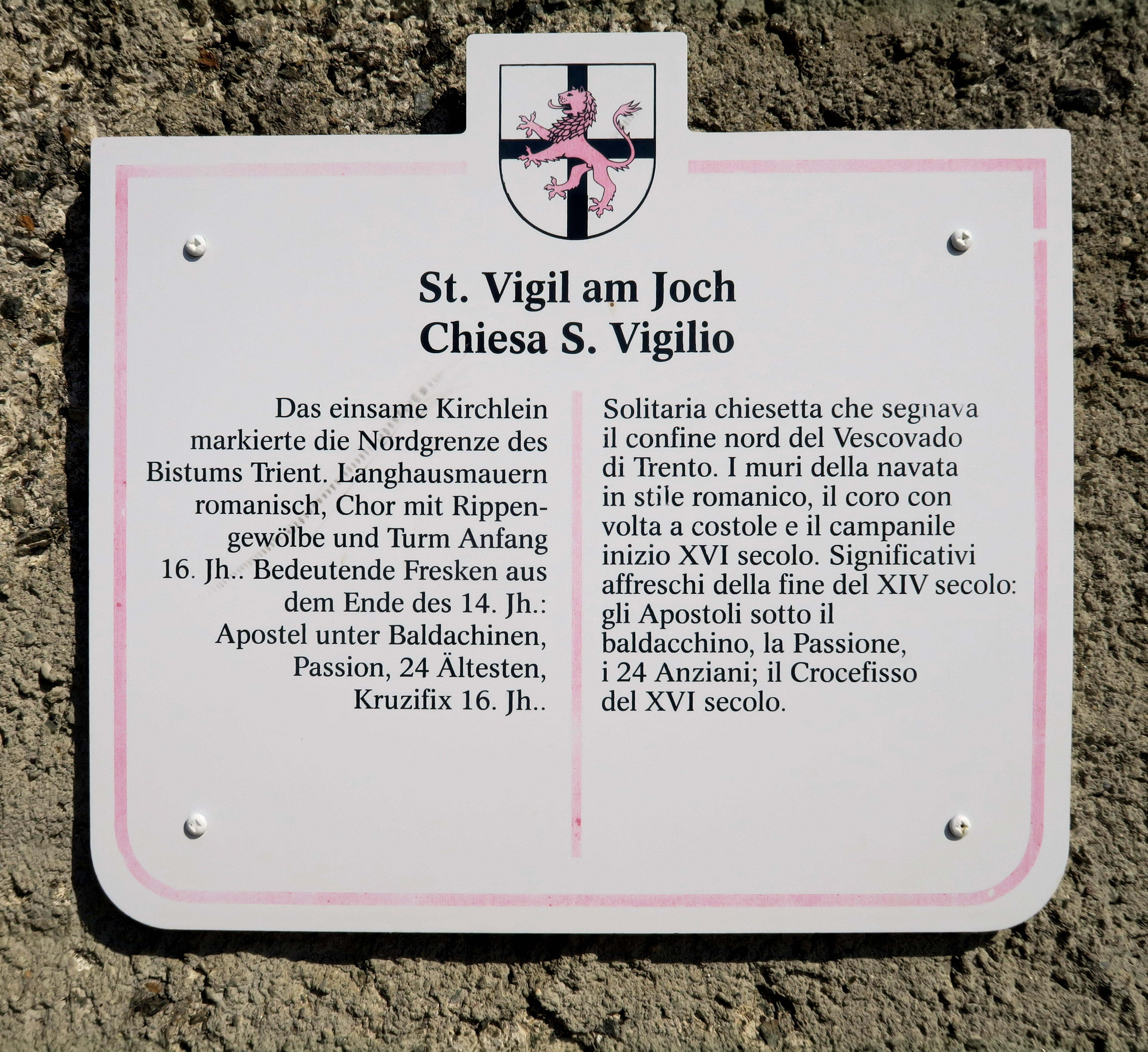 Plakette an der Kirche St. Vigil am Joch in der Gemeinde Lana (Südtirol, Italien)